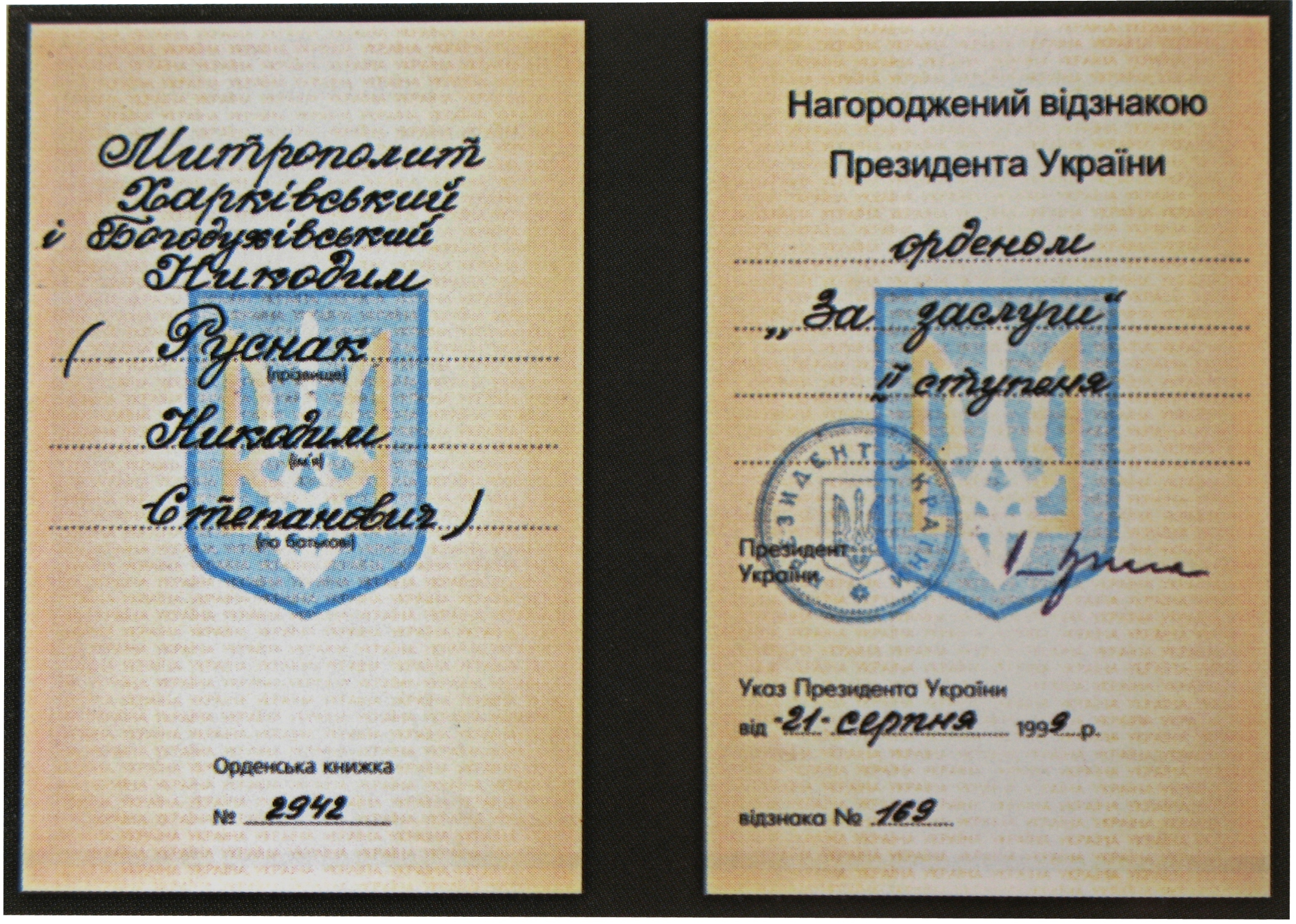 Order of Merit (Ukraine) book № 2942 (1999). Nikodim (Rusnak). Leonid Kuchma signature. Орденская книжка № 2942 ордена «За заслуги» Украины II степени митрополита Никодима Руснака. 1999. Подпись президента Украины Л. Кучмы (не факсимиле). Печать президента Украины. Награждение произведено за два дня перед днём освобождения Харькова (23 августа).